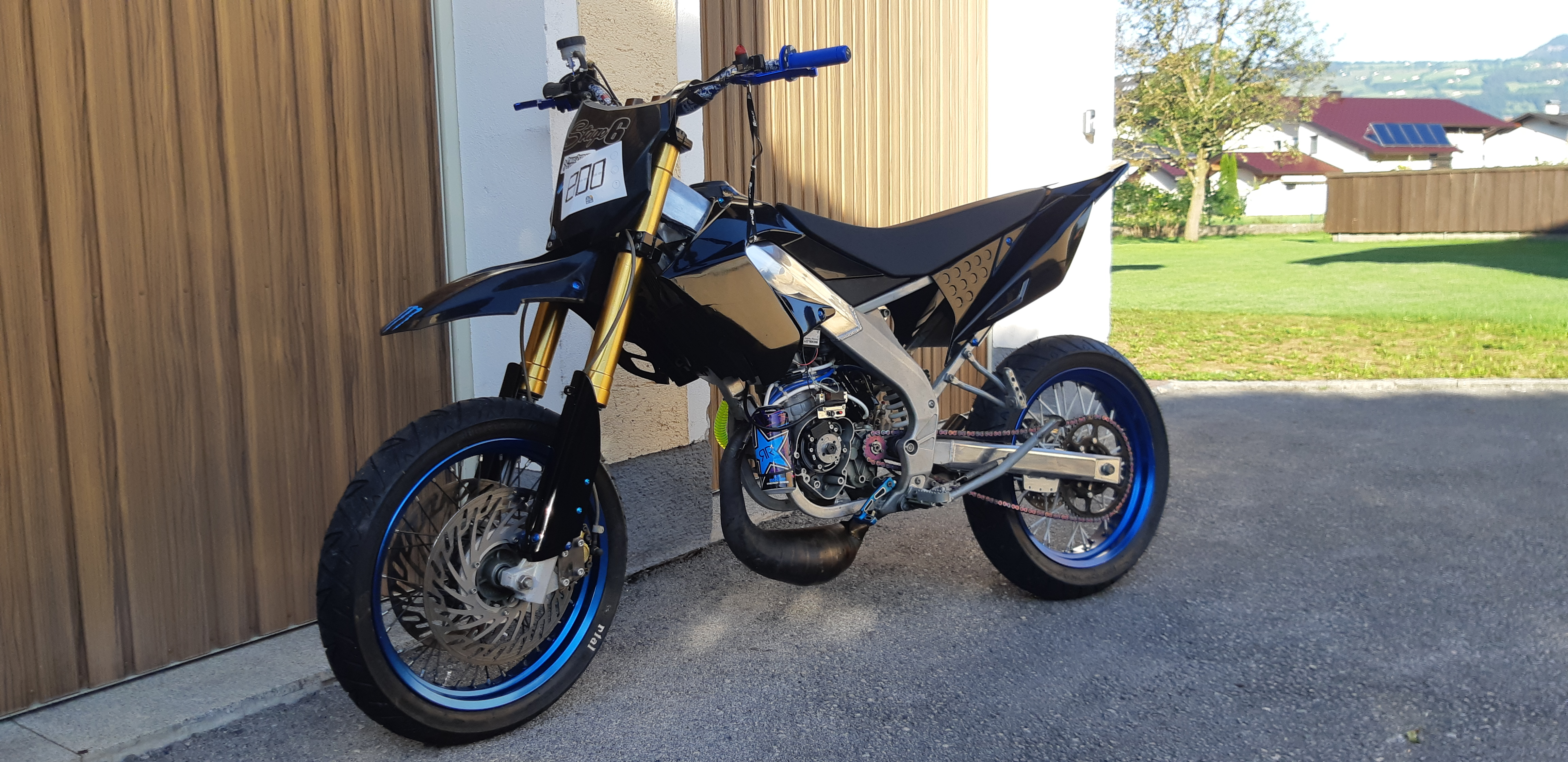 Derbi drd Pro in Österreich